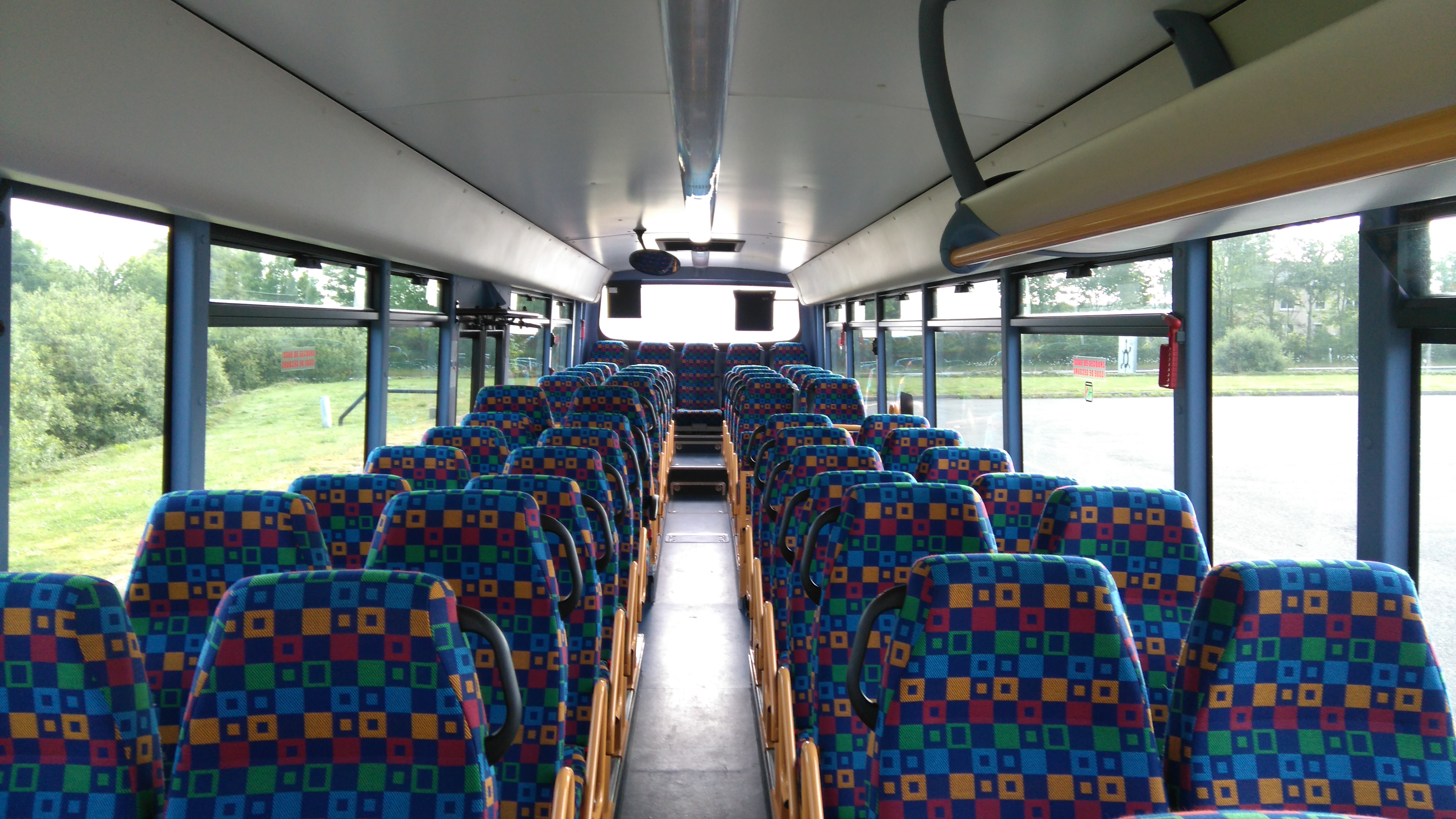 Irisbus Récréo 12,80m - Intérieur